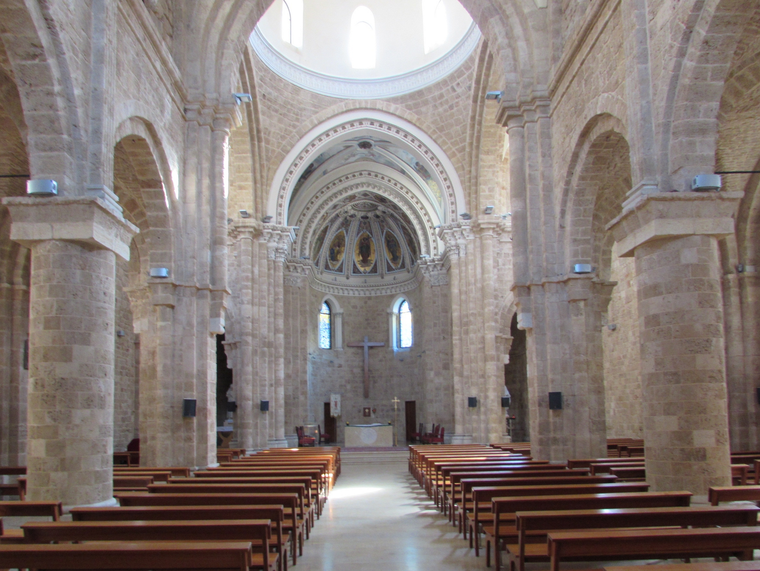 die kirche st louis (st. ludwig) in beirut, das kircheninnere